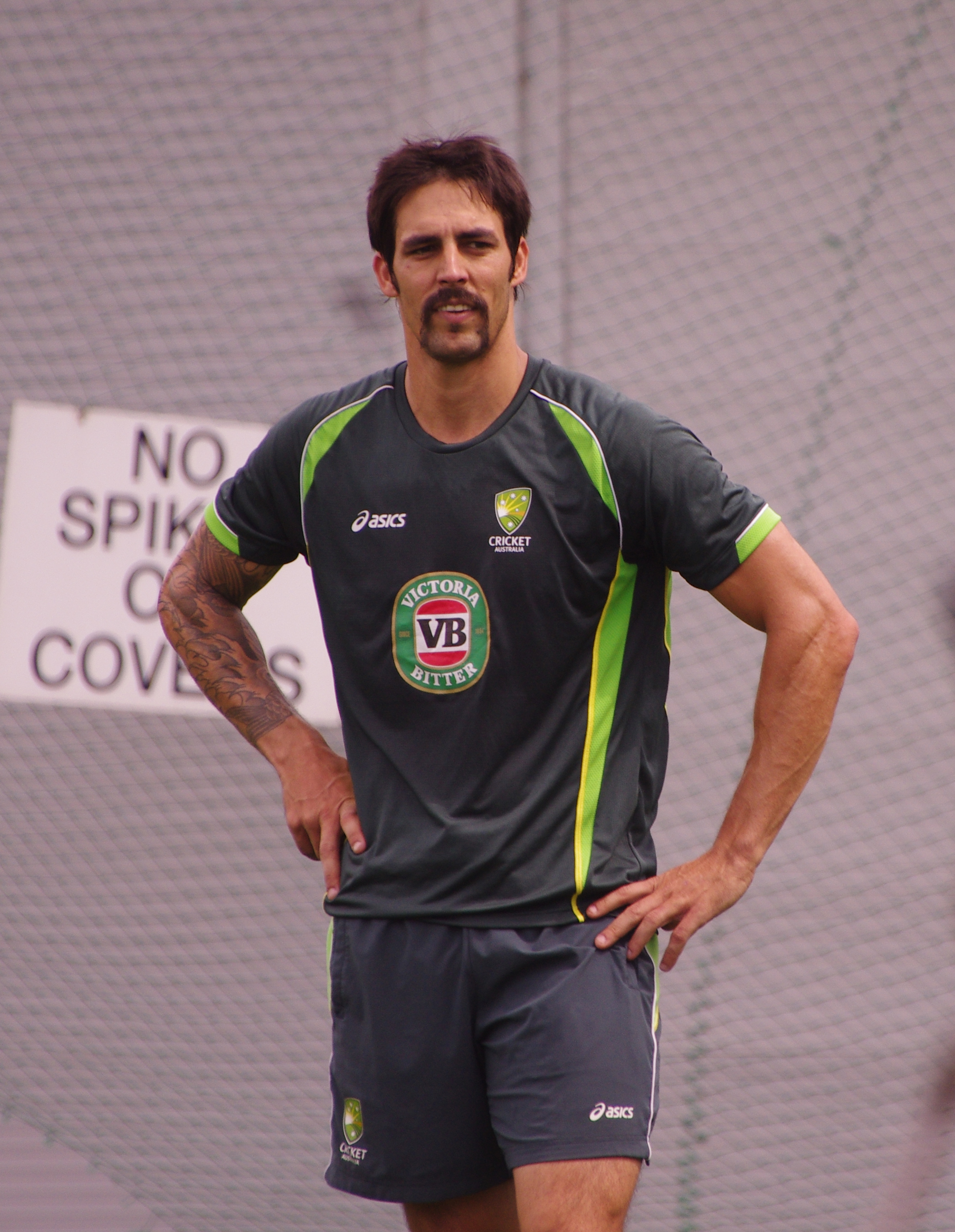 MITCHELL JOHNSON